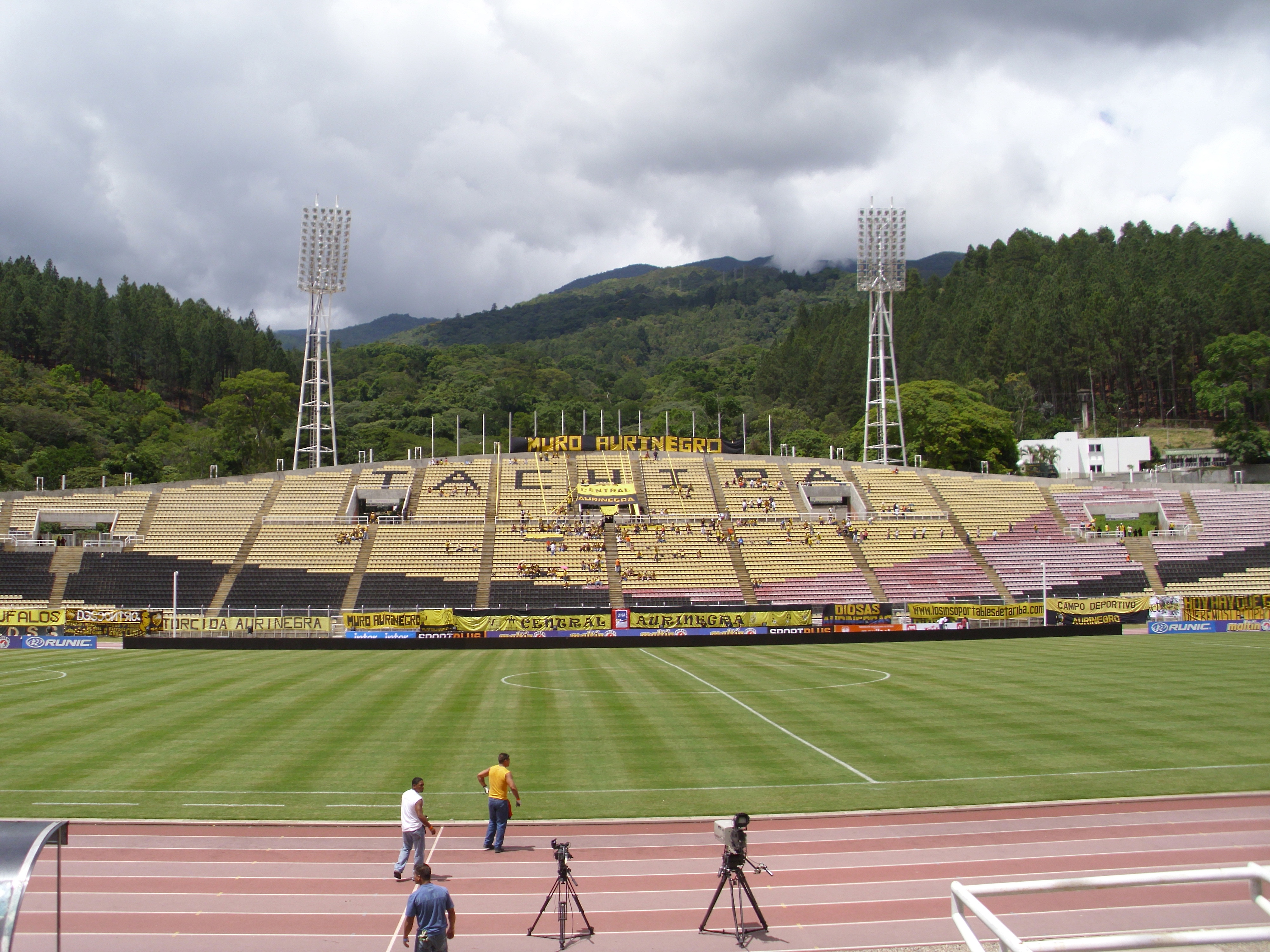 Vista de la Pista Atlética del Estadio Polideportivo de Pueblo Nuevo.